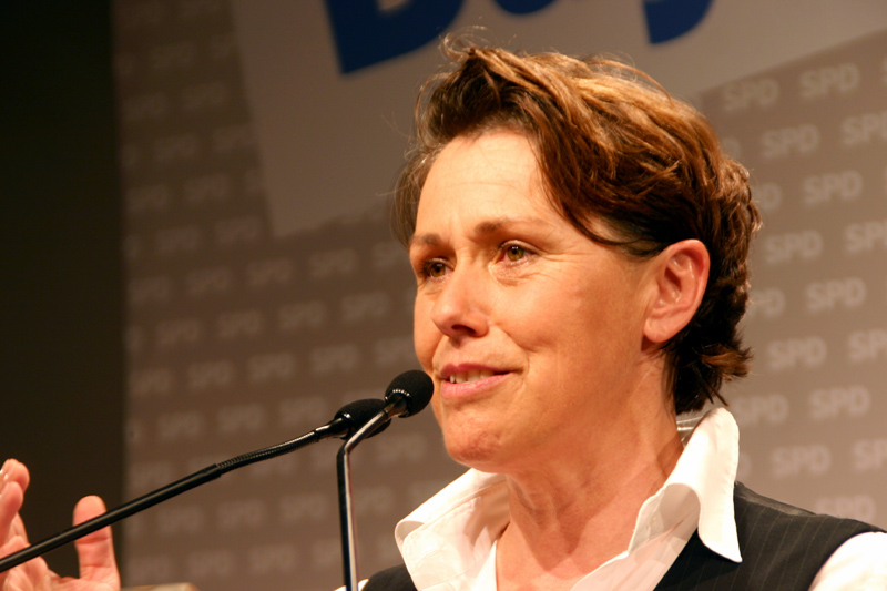 Adelheid Rupp, deutsche Politikerin (SPD). Mitglied des Bayerischen Landtages und stellvertretende Vorsitzende der bayerischen SPD.